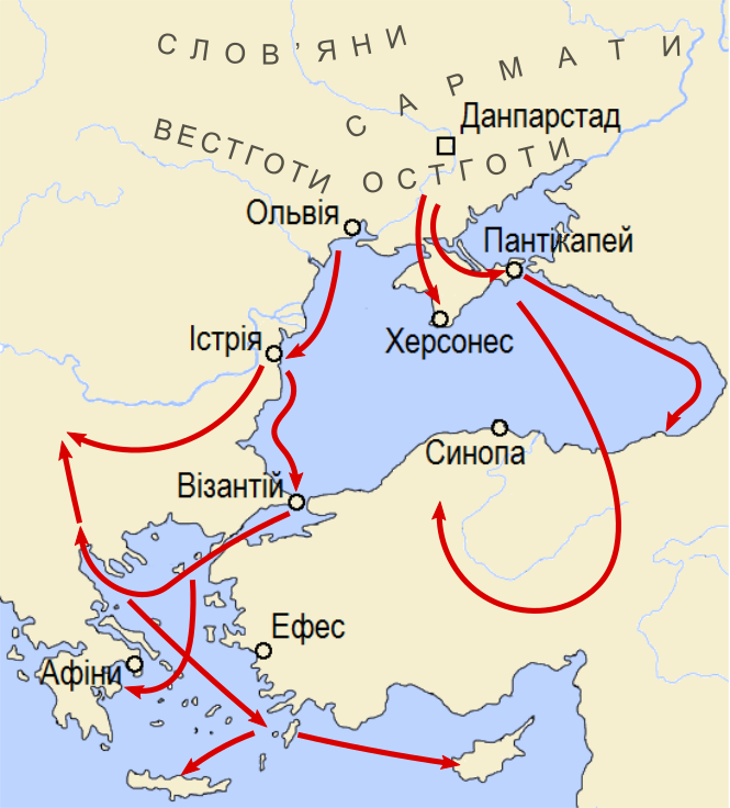 Напади готів та їніх спільників на сусідні держави у другій половині III ст.